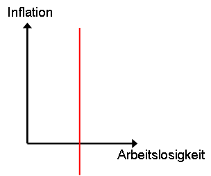 monetaristische Phillips-Kurve